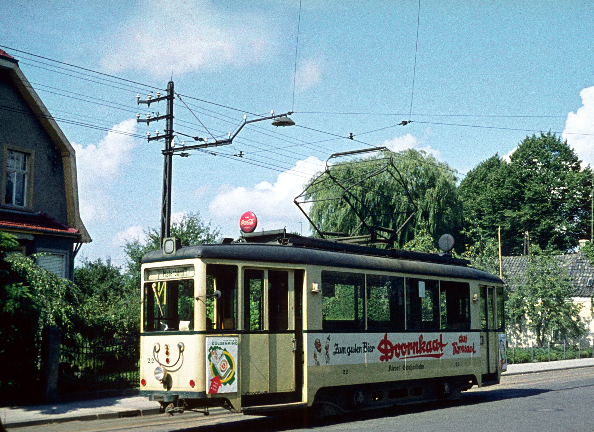 Aufbau tram nr.22 in Kleef, Kellen